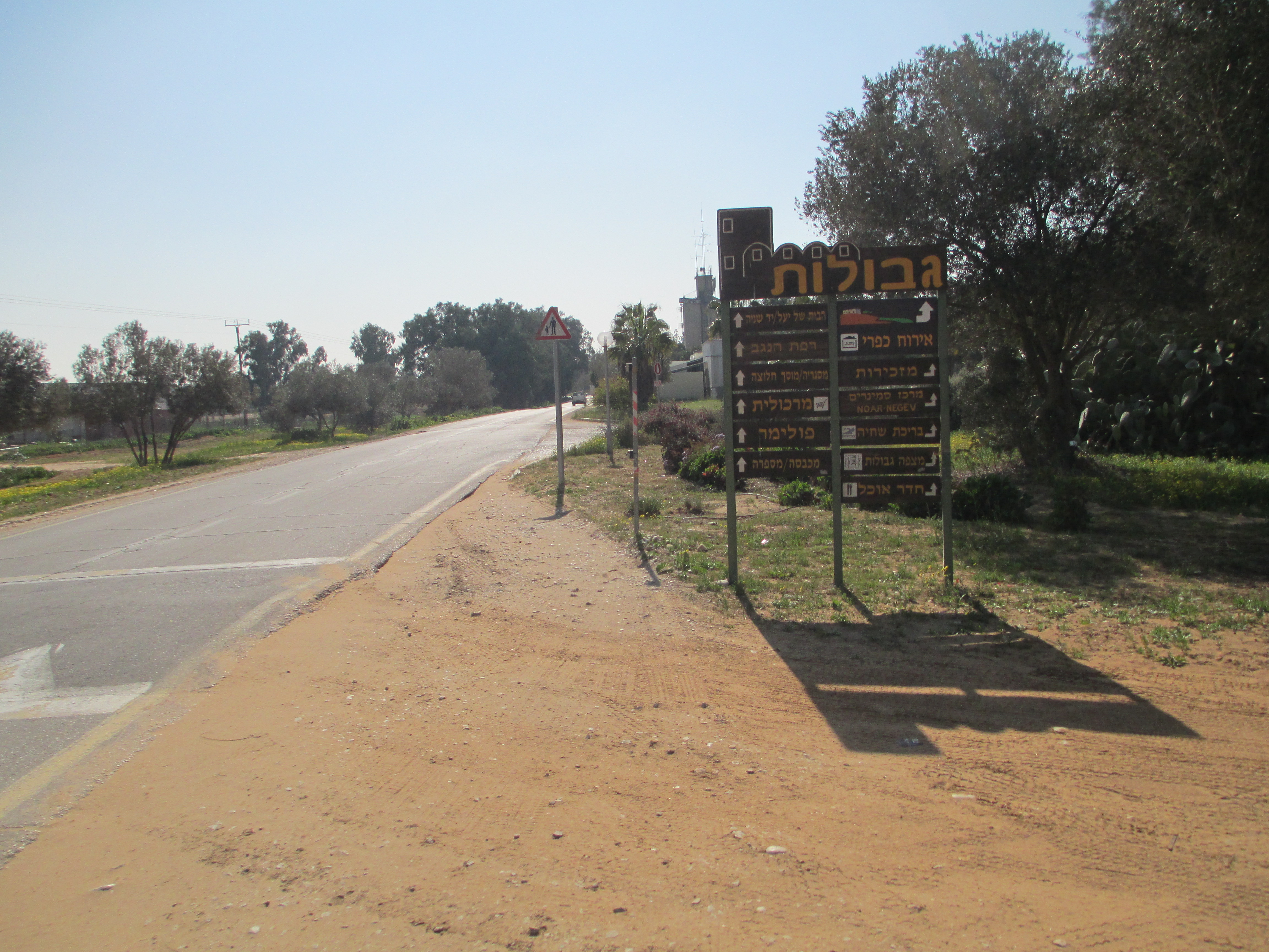 הכניסה לקיבוץ גבולות